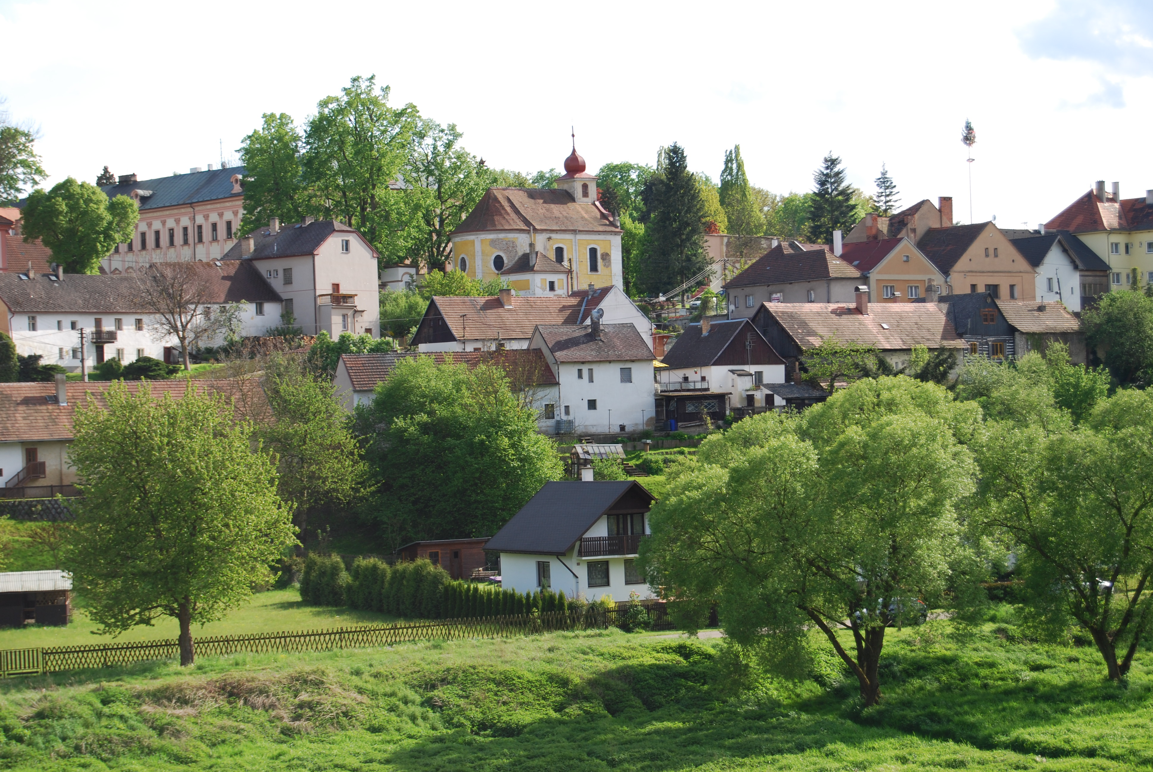 Pohled na ves z mostu. Liblín je vesnice v okrese Rokycany, kraj Plzeňský. Česká republika.